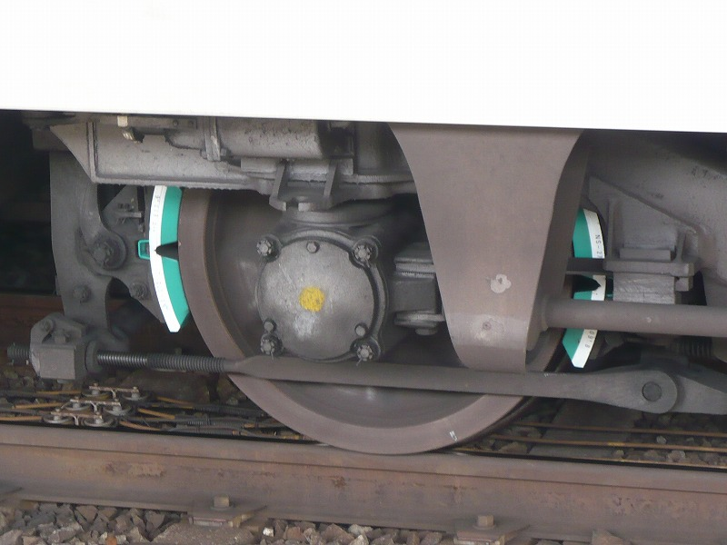 地下鉄6000系の基礎ブレーキ